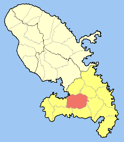 Location of Rivière-Salée within Martinique